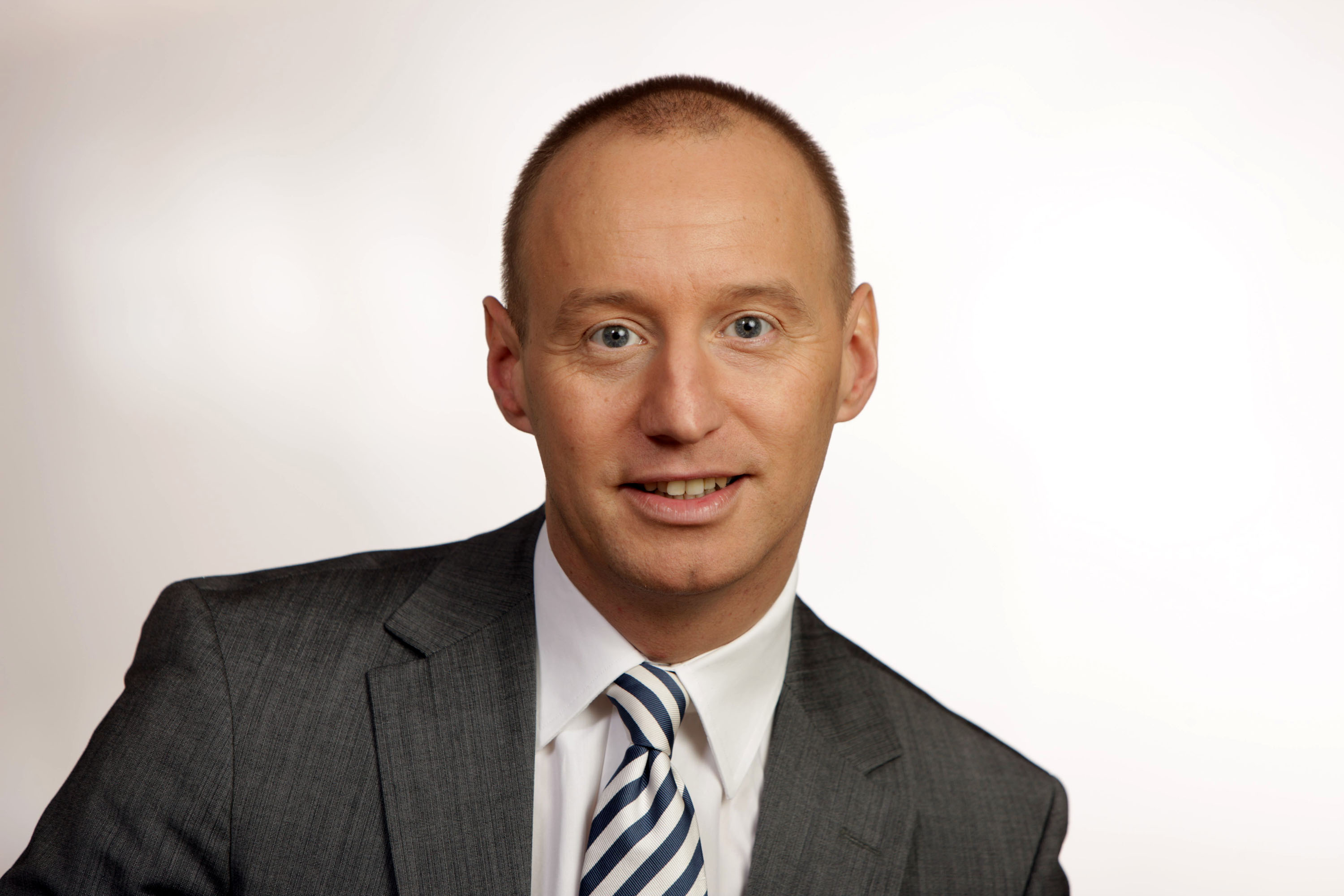 Michael Kauch MdB, MItglied des Deutschen Bundestags (FDP)